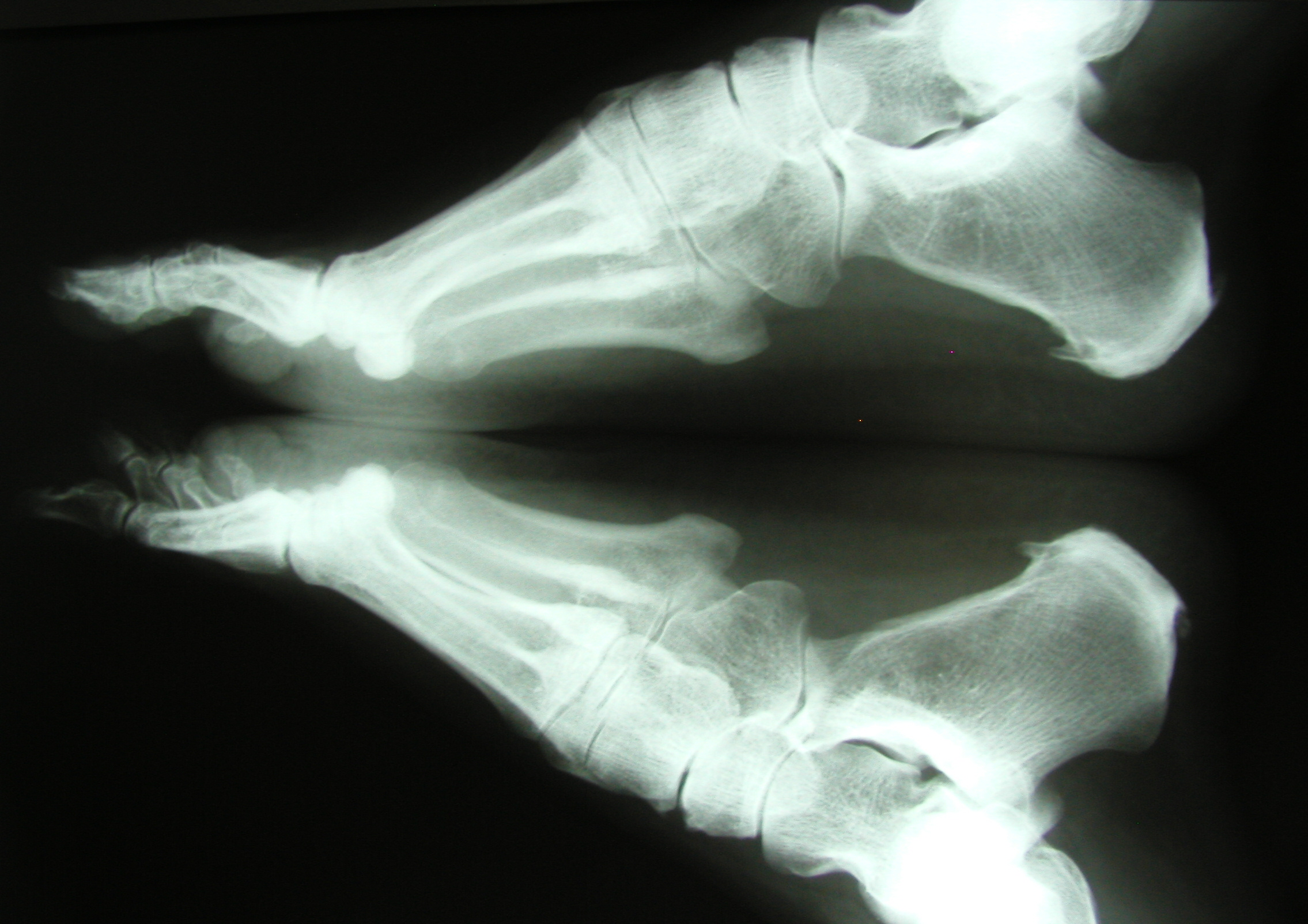 Calcar Calcanei X-ray.